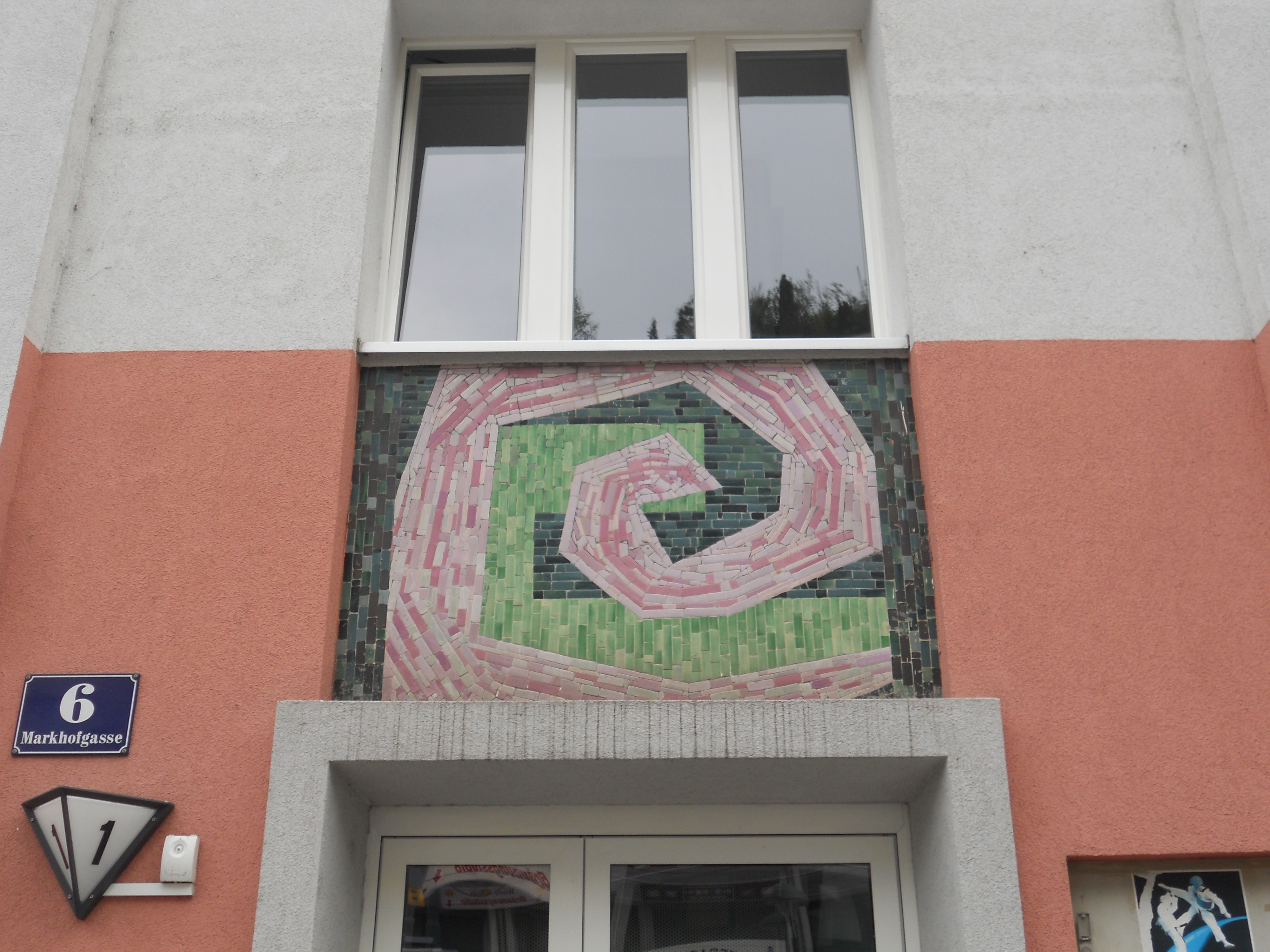 Kommunale Wohnhausanlage Markhofgasse 6 in Wien. Oberhalb der Eingänge Mosaike von Oskar Schmal